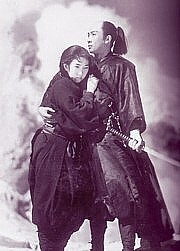 『まぼろし城 第一部』、1940年、スチル写真